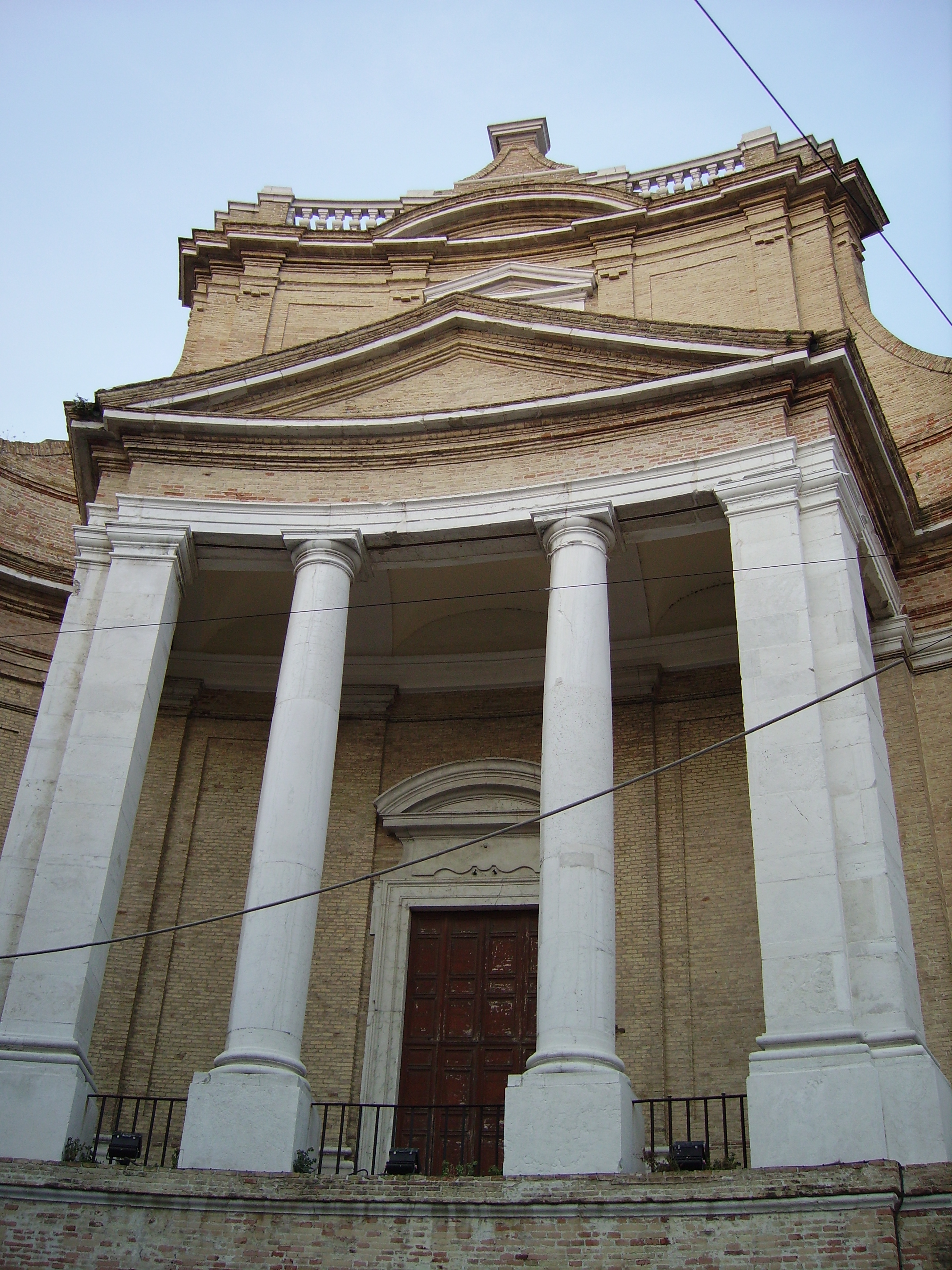 Chiesa del Gesù, di Luigi Vanvitelli, in piazza Stracca ad Ancona